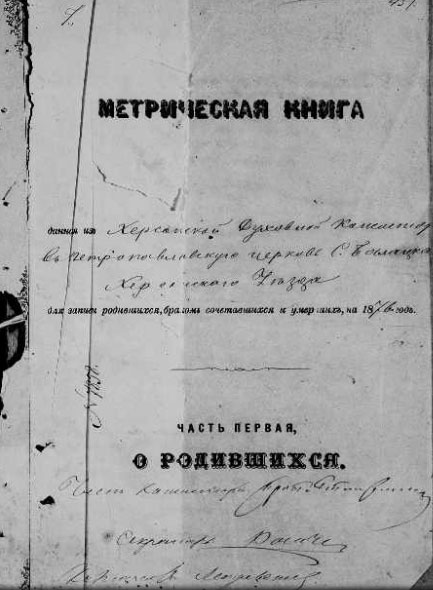 Титульна сторінка метричної книги